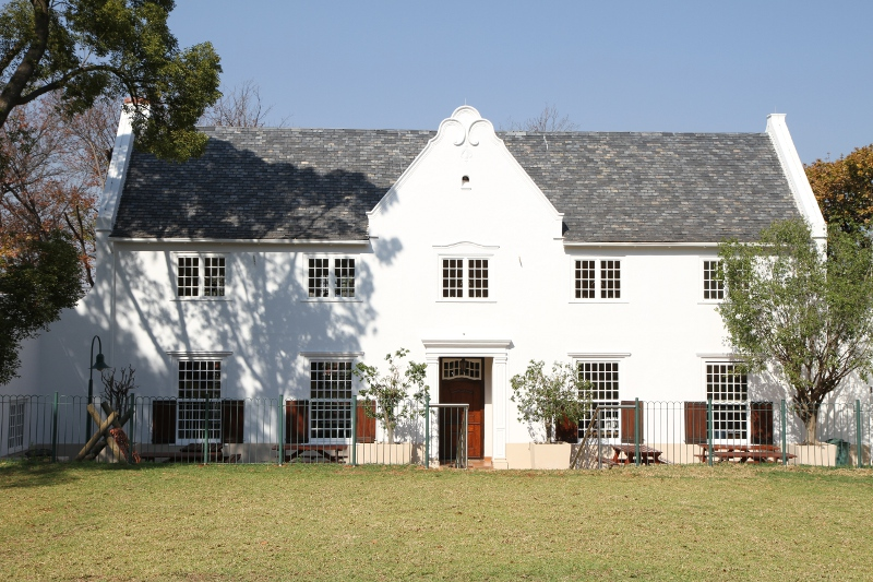 Le campus de Pretoria. Je me suis échangé avec la direction du lycée Jules Verne qui ma fourni cette image avec d'autre.